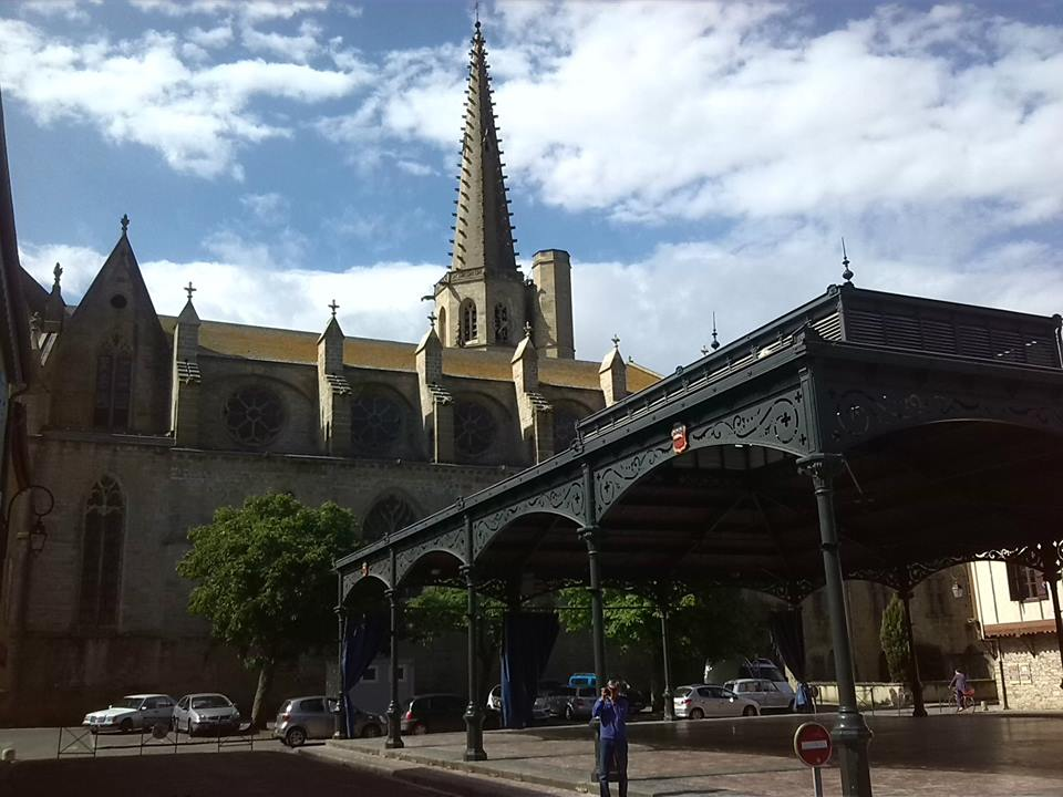 Vue septentrionale de la cathédrale Saint-Maurice de Mirepoix (09).